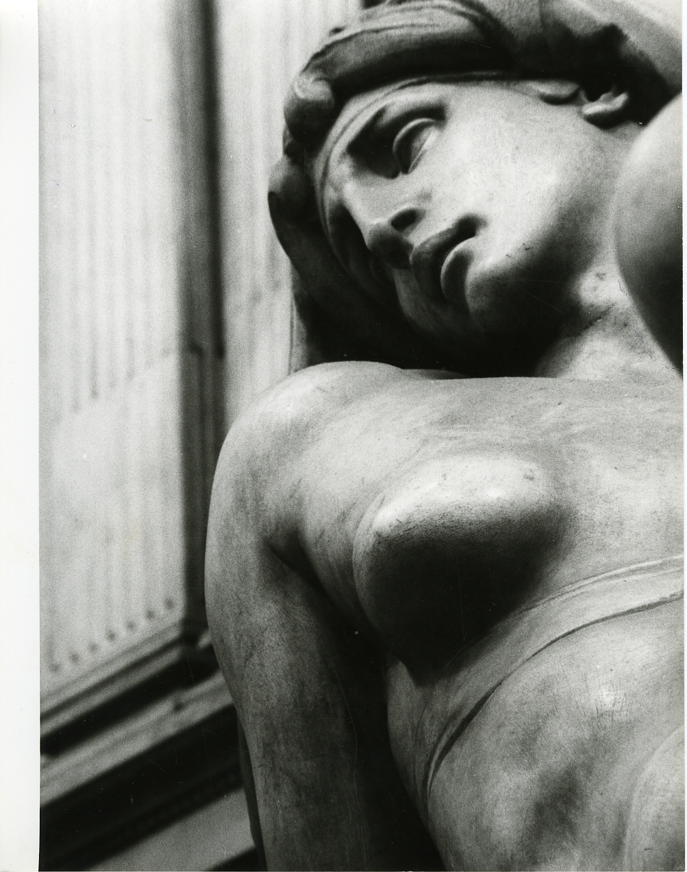 Firenze. Tombe medicee. Dettagli delle sculture realizzate da Michelangelo nella Cappella medicea della Sagrestia Nuova presso la Basilica di San Lorenzo. Servizio fotografico : Firenze, 1975 / Paolo Monti. - Stampe: 25 : Positivo b/n, gelatina bromuro d'argento/ carta, 24x30. - ((Al verso delle stampe manoscritto numero di negativo corrispondente: 2767. La suddetta serie è contenuta nella scatola identificata con il n. 26. Sul coperchio iscrizione manoscritta a pennarello: "Sculture/ Michelangelo". - Occasione: Documentazione per la pubblicazione: "Michelangelo", n. 14, collezione "I grandi di tutti i tempi", Milano, A. Mondadori. - Fonte: Fattura di Paolo Monti: IV. Commesse/ Fattura n. 4 (1976/03/09), presso Archivio Paolo Monti